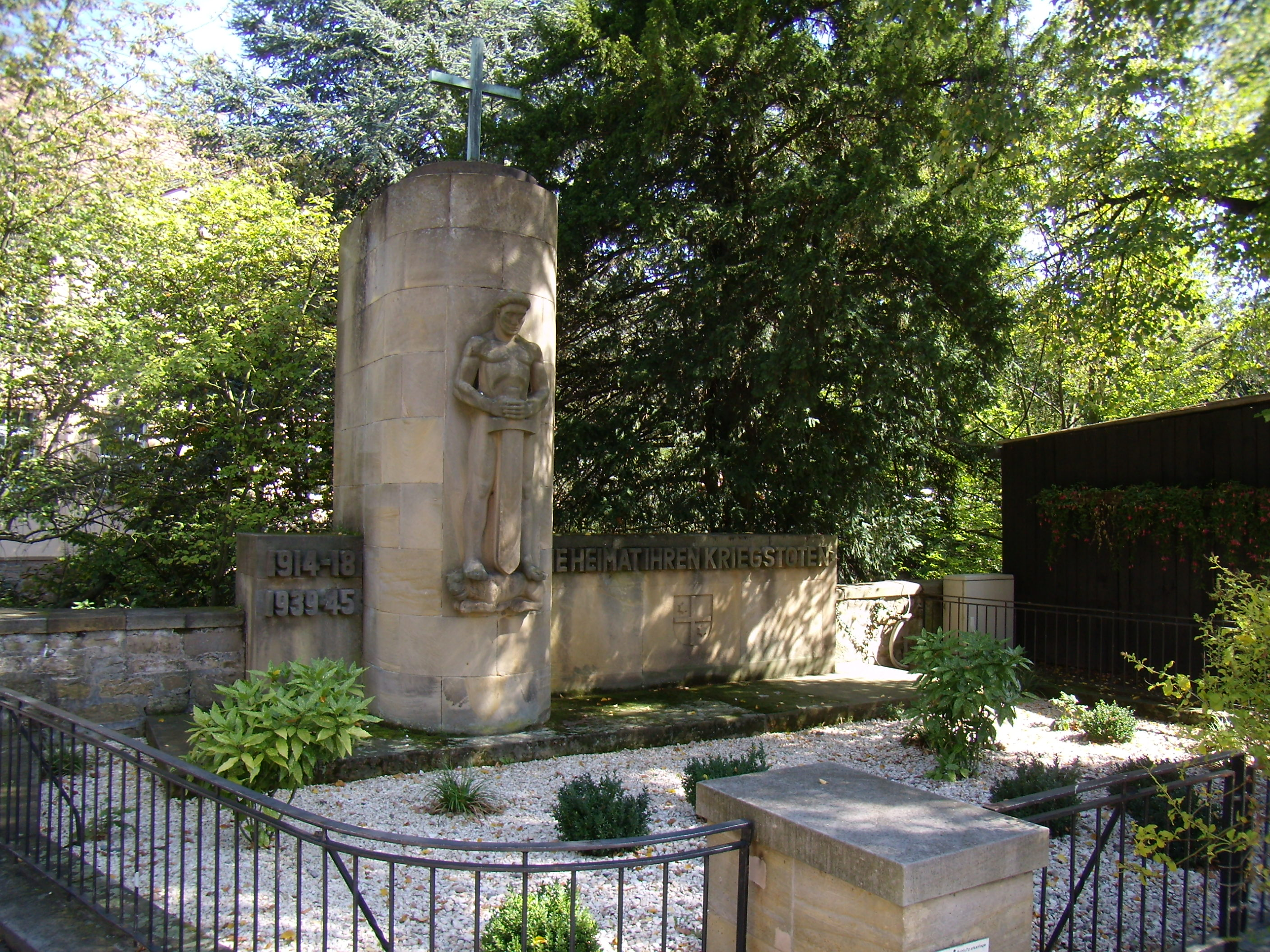 Deidesheim - Schlossstraße Kriegerdenkmal